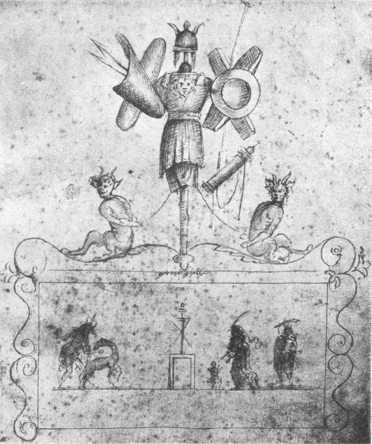 Codex Escurialensis, Skizzenbuch aus der Werkstatt Domenico Ghirlandaio, vor 1509.[1] – Dekoratives Detail von der Decke der Camera 24 von Neros Domus Aurea. Zwei sitzende gefesselte Satyrn zu beiden Seiten einer Trophäe mit Panzer, geflügeltem Helm und Gorgonenhaupt, und verschiedenen Waffen an den Armen. Darunter ein Bildfeld mit einer stilisierten Trophäe, umgeben von einer Frau mit einem jungen Pferd, einer Frau mit Kind und einem Krieger mit Schwert und Schild.